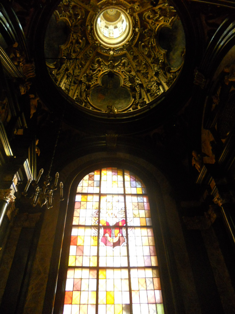 Wnętrze Kaplicy Zadzika na Wawelu.